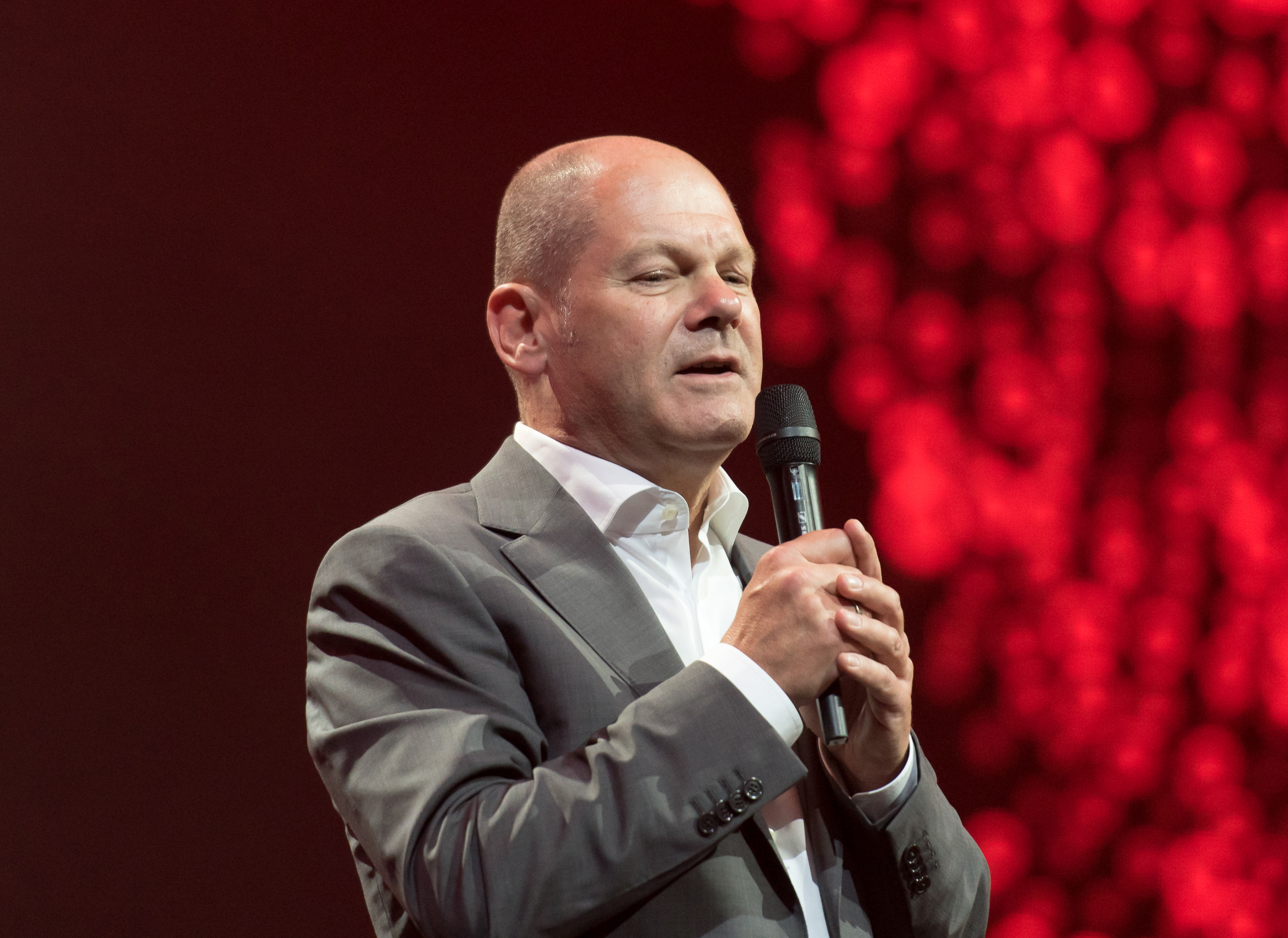 Olaf Scholz ' beim Global Citizen Festival in Hamburg